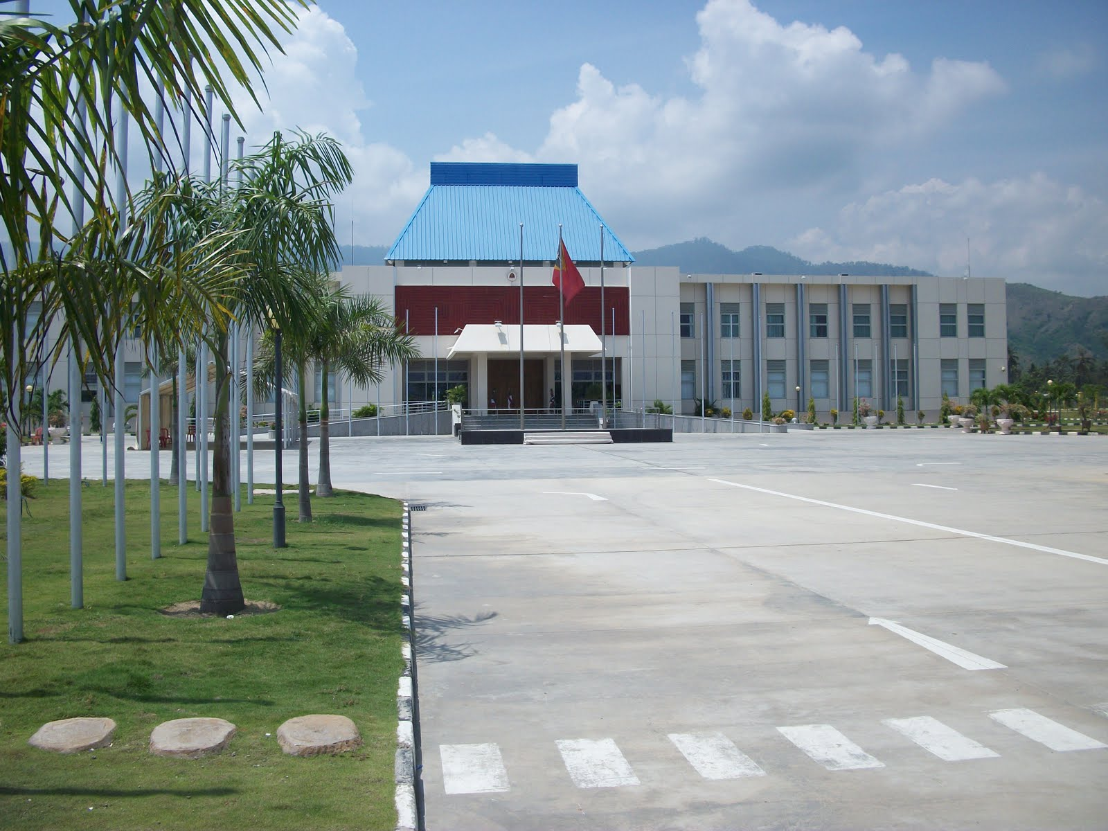 Tetun: Palasiu ba Presidente sira